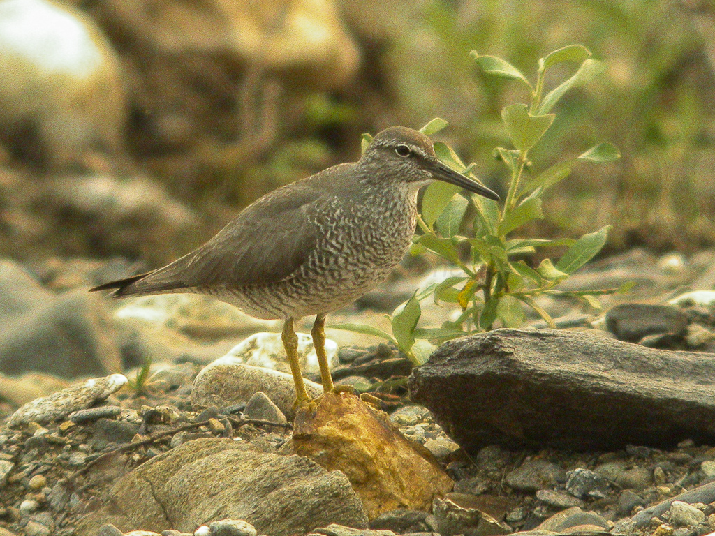 Wandering Tattler Tringa incana, Nome, Alaska